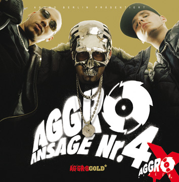 Cover des Samplers „Aggro Ansage Nr. 4X“